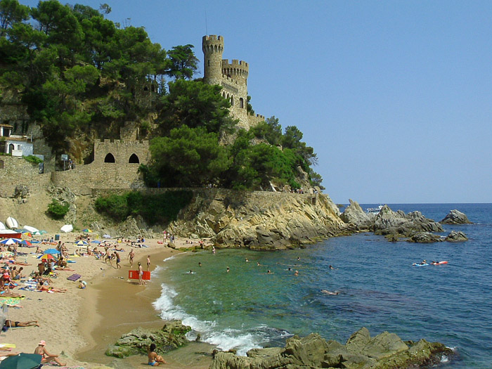 Sa Caleta, al peu del Castel d'en Plaja, a Lloret de Mar (Selva).